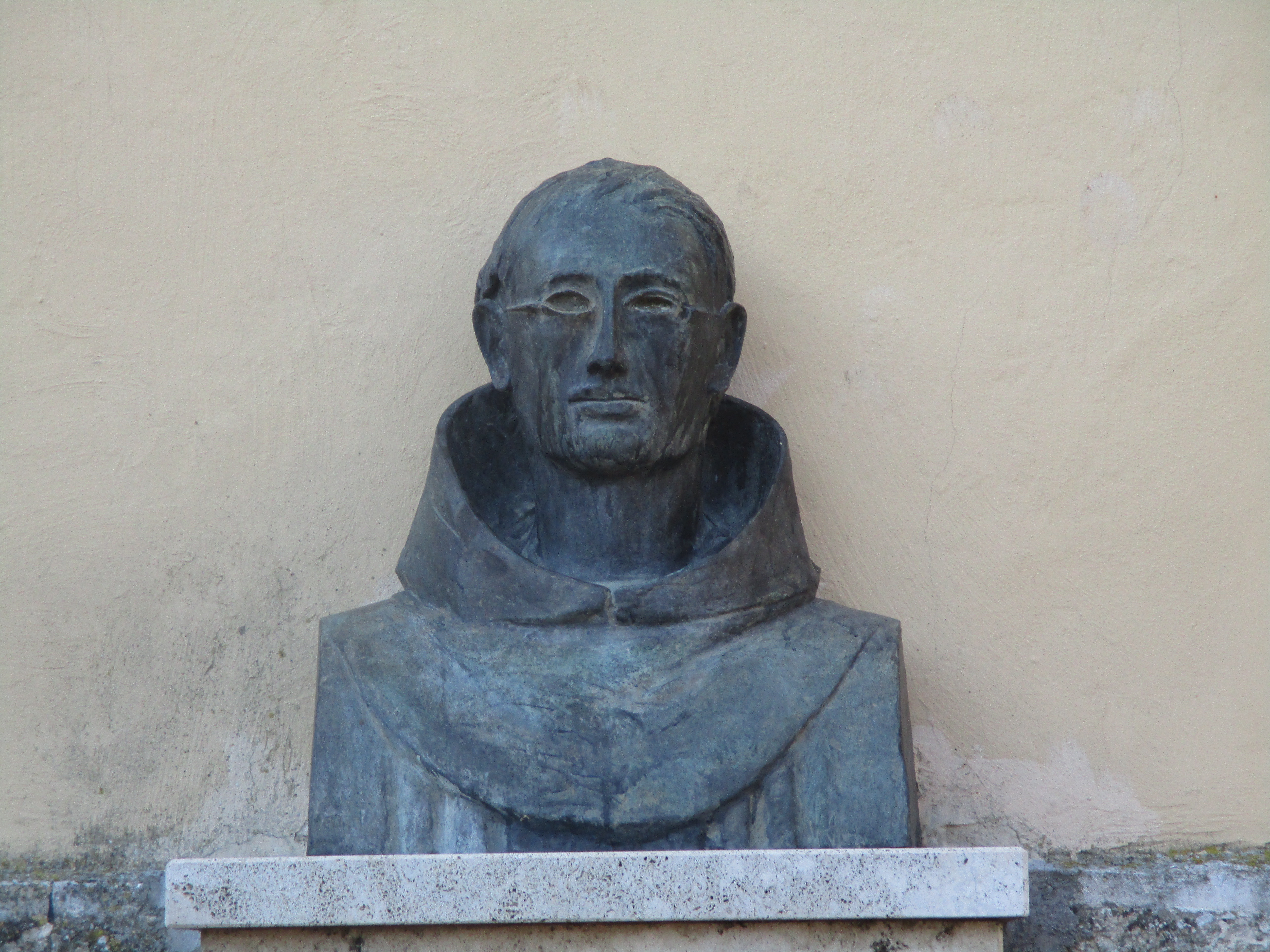 Mezzobusto di Panfilo da Magliano